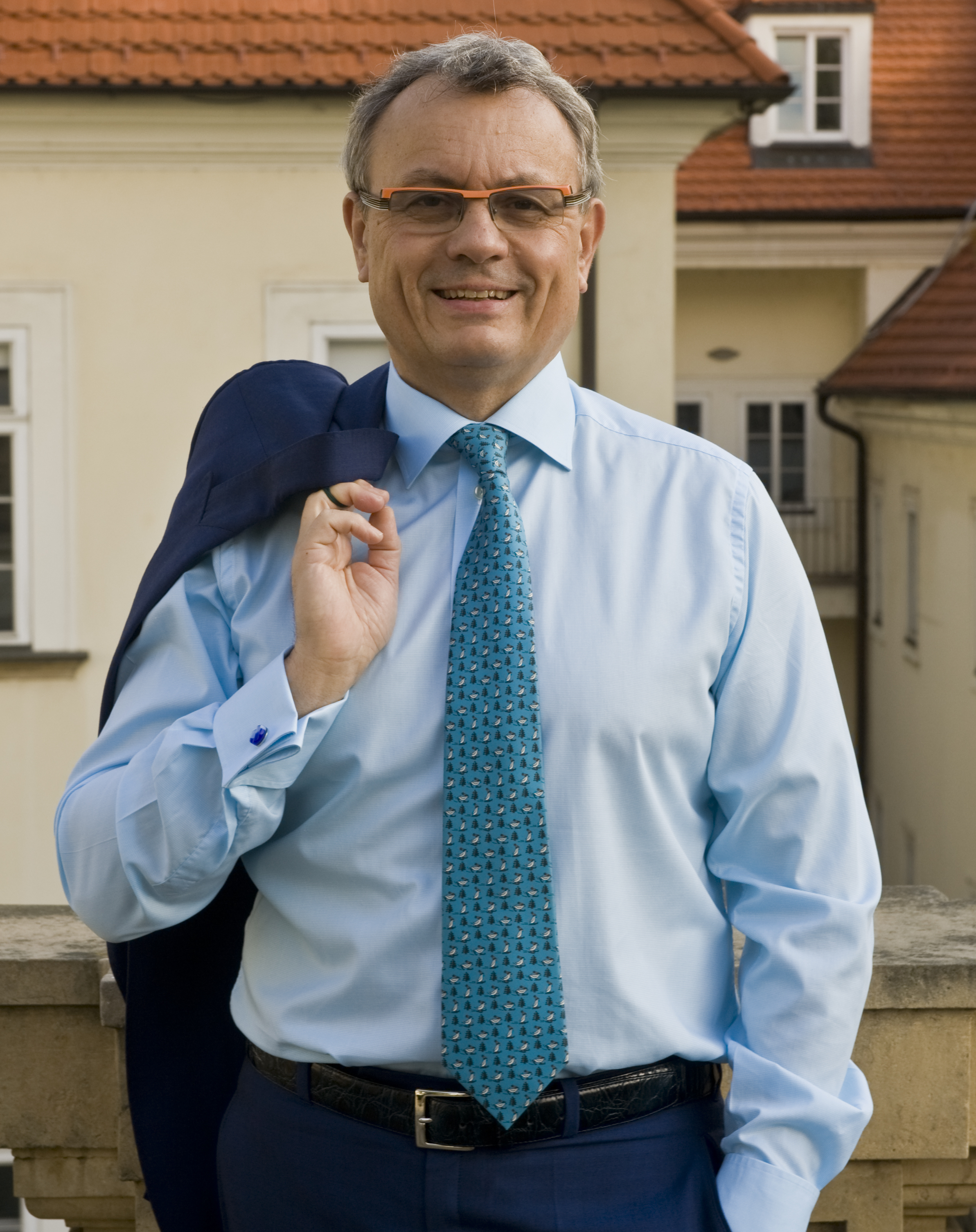 Vladimír Dlouhý (* 1953), ekonom a politik, bývalý ministr průmyslu a obchodu ČR, kandidát na prezidenta ČR